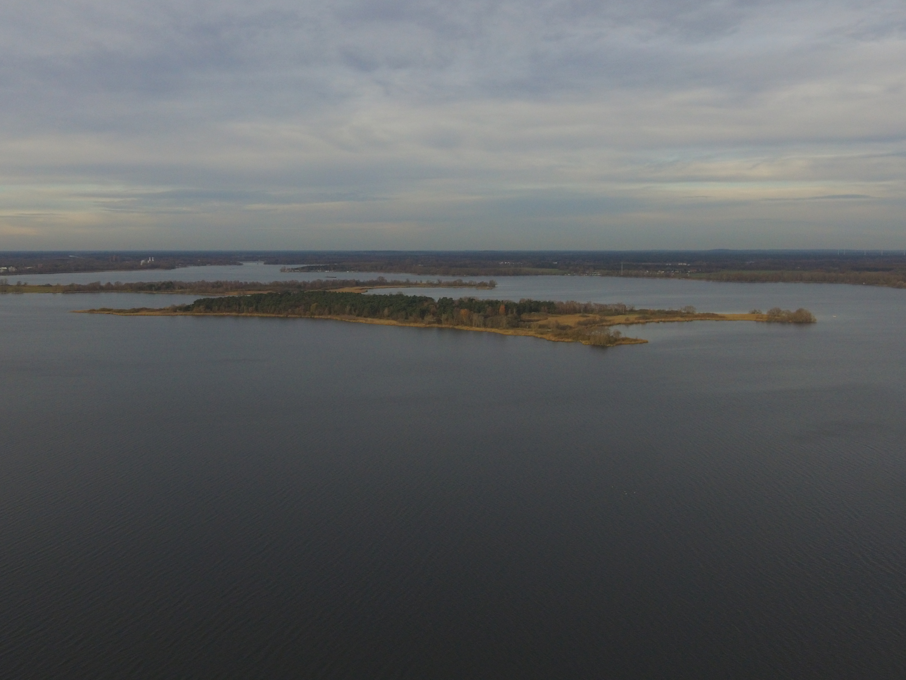 Die Insel Buhnenwerder zwischen Plauer und Breitlingsee in Brandenburg an der Havel